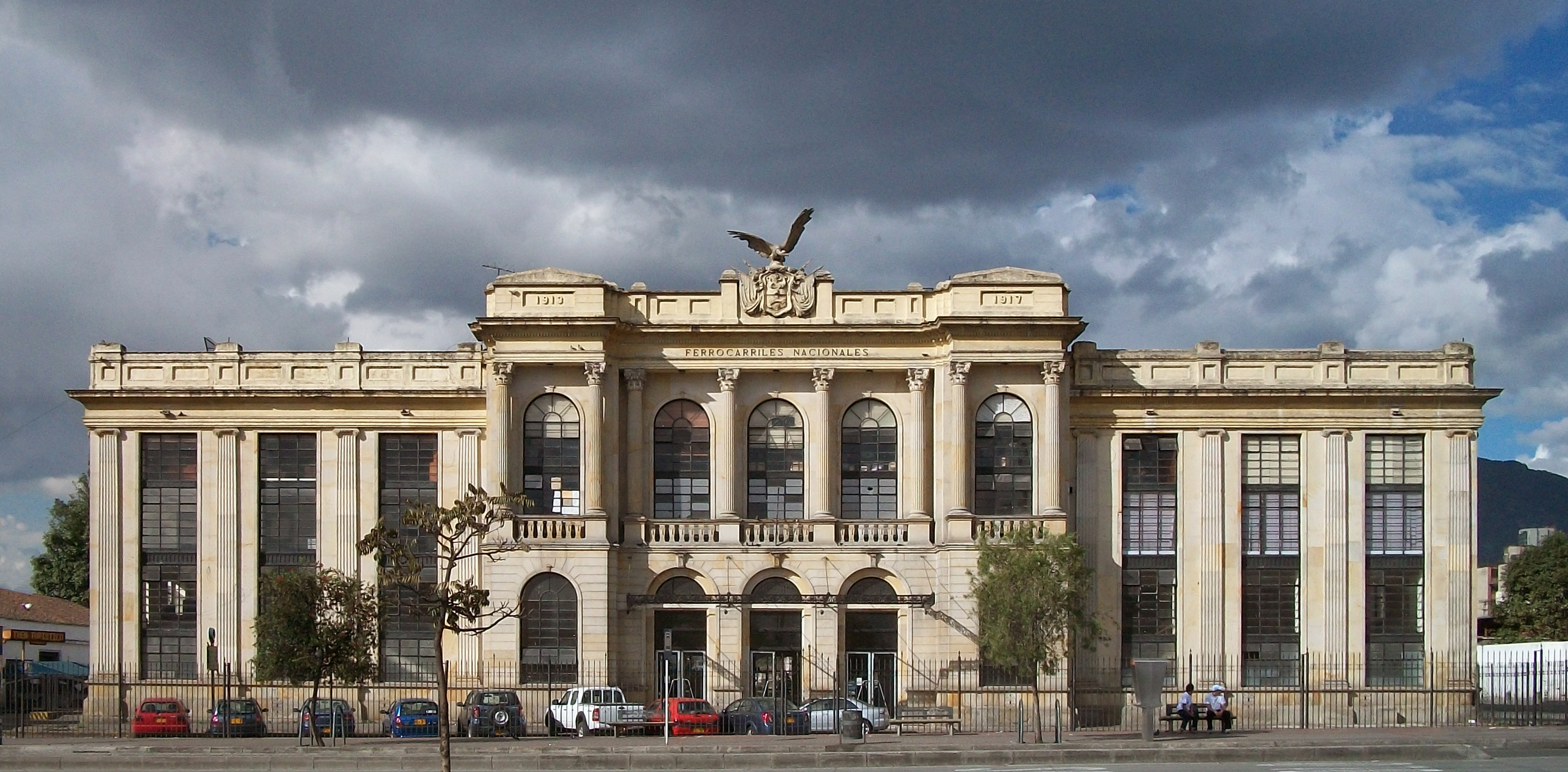 Fachada de la Estación de la Sabana de Bogotá.